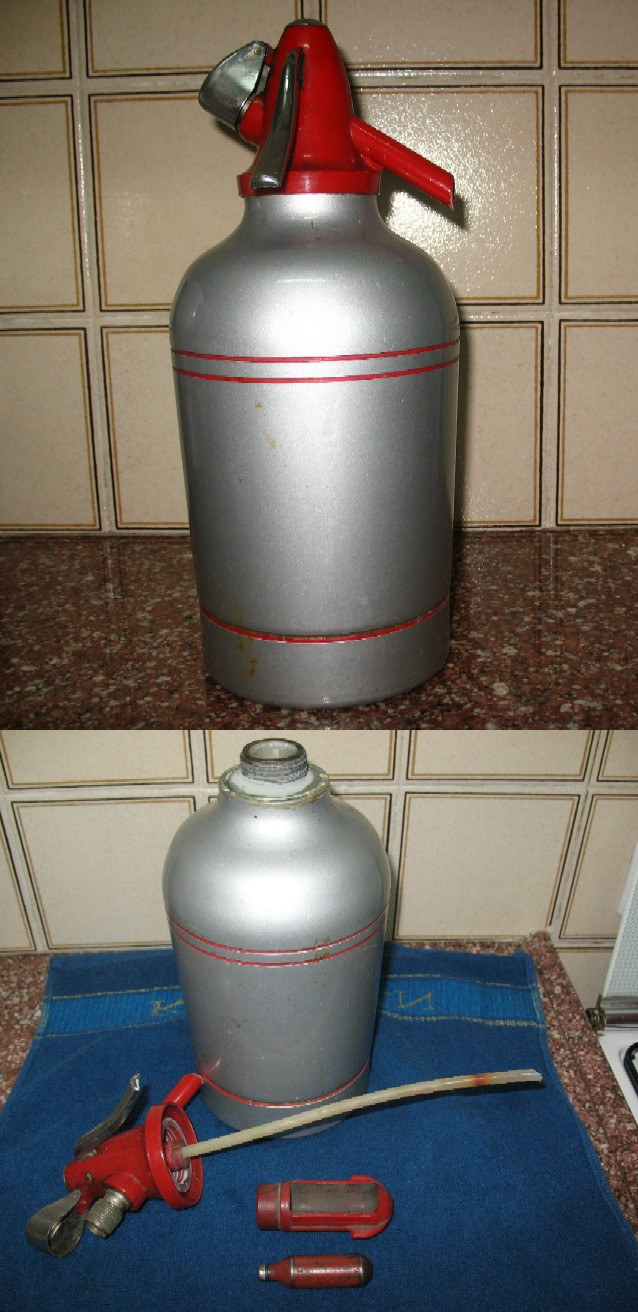 בקבוק סיפולוקס שני ליטר רישיון נוצר על ידי משתמש:שנילי